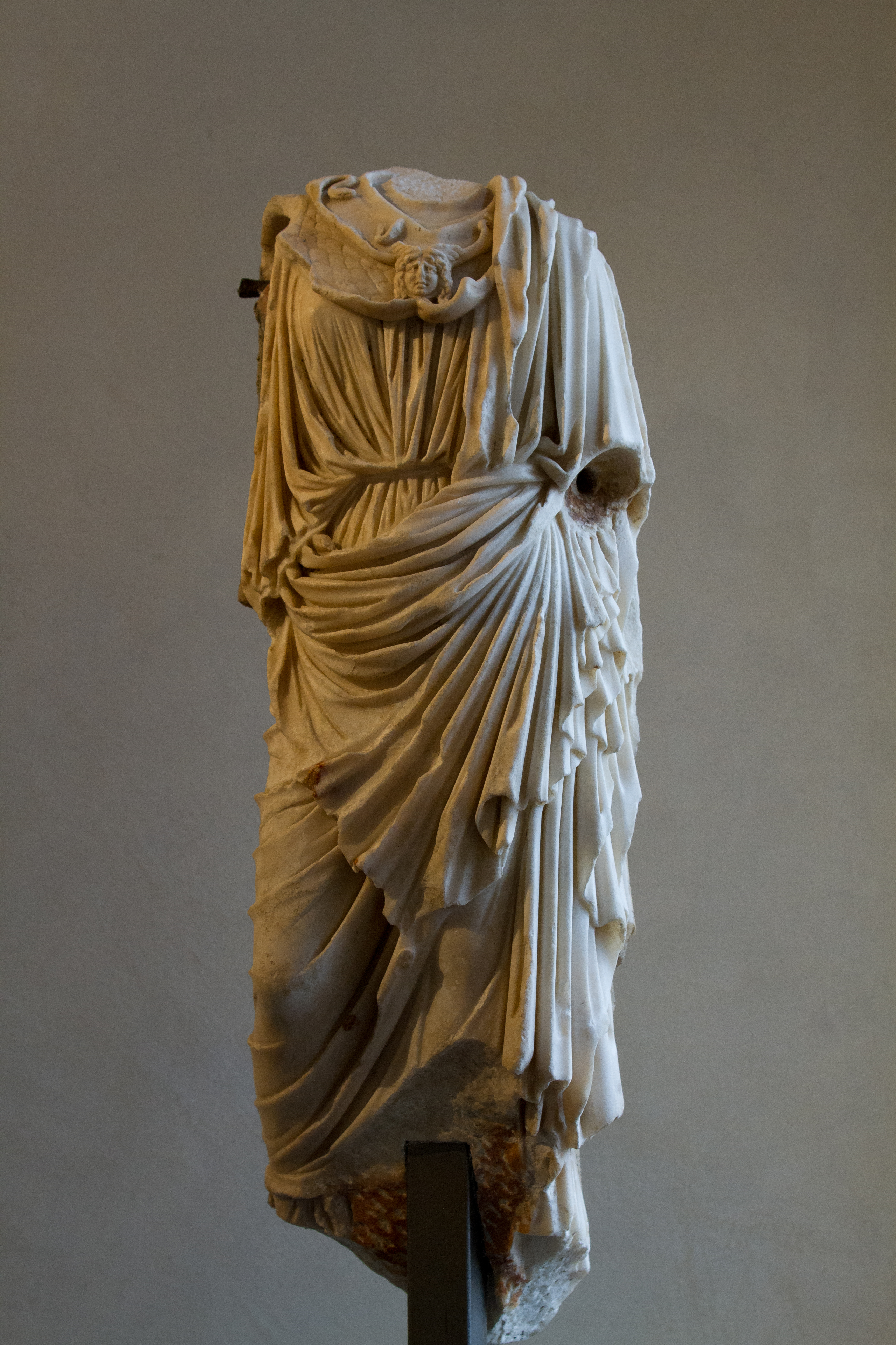 Statuette d'Athéna-Minerve - Inv 30340